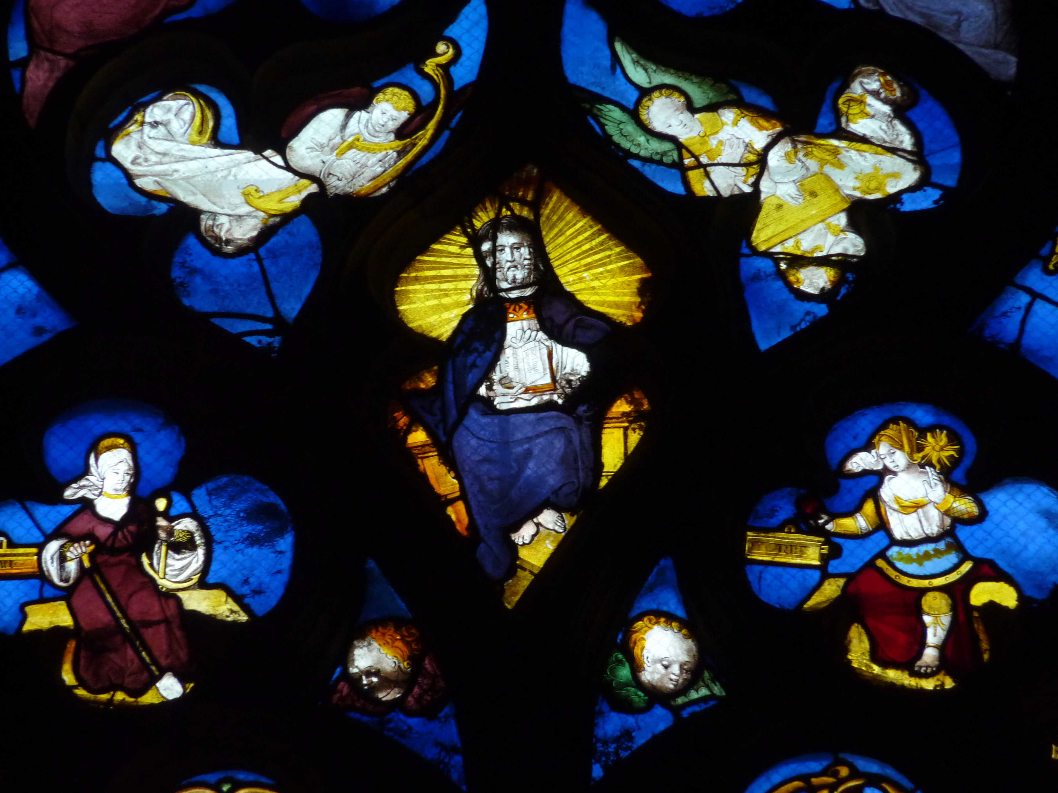 Bleiglasfenster (Baie 23) in der Stiftskirche Notre-Dame-en-Vaux in Châlons-en-Champagne im Département Marne (Champagne-Ardenne/Frankreich), mit der Jahreszahl 1527; Darstellung: Szenen aus dem Leben Marias; Ausschnitt Maßwerk: Dreifaltigkeit als Person mit drei Gesichtern